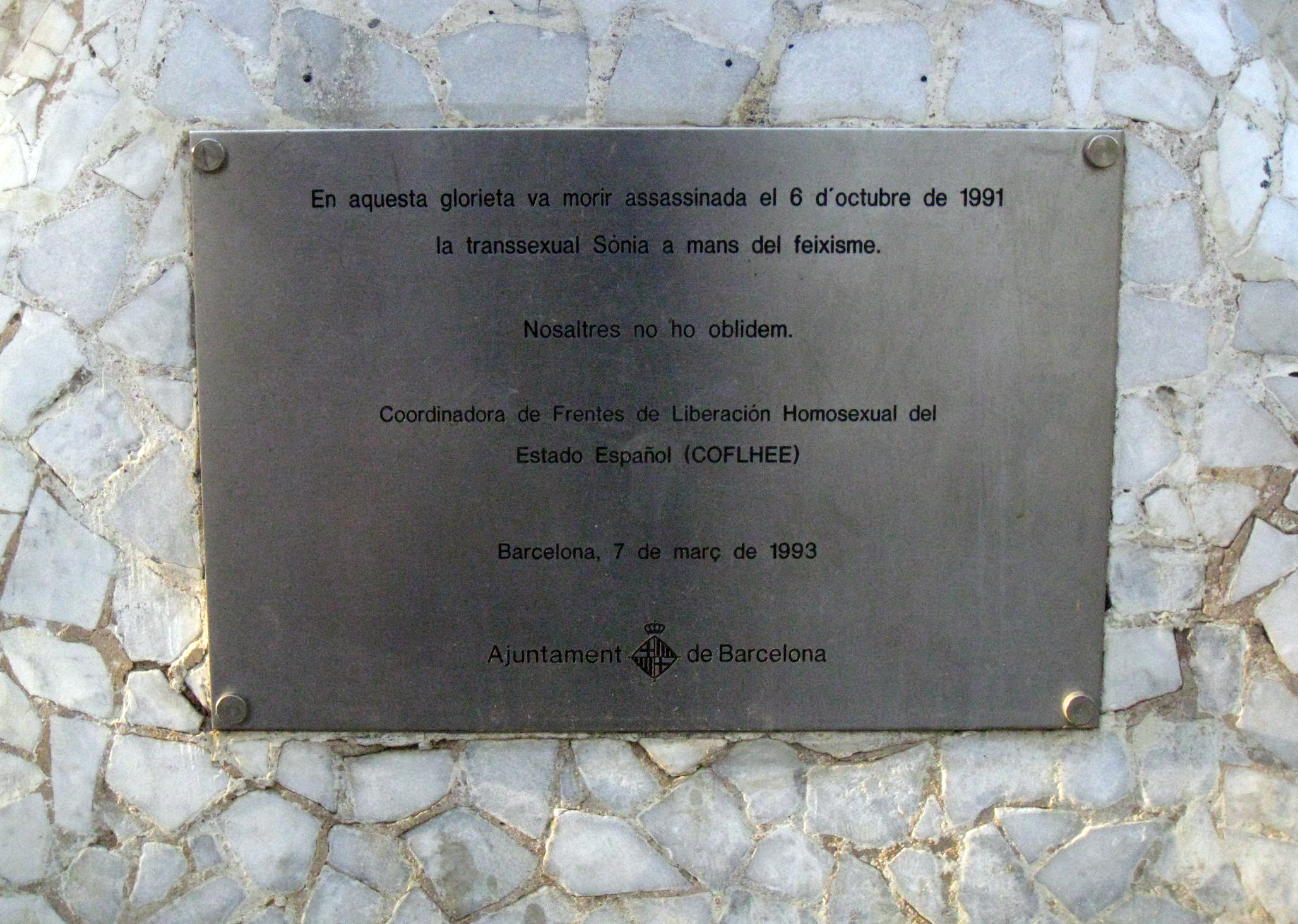 Sònia. Parc de la Ciutadella -Kiosc de música- (Barcelona)